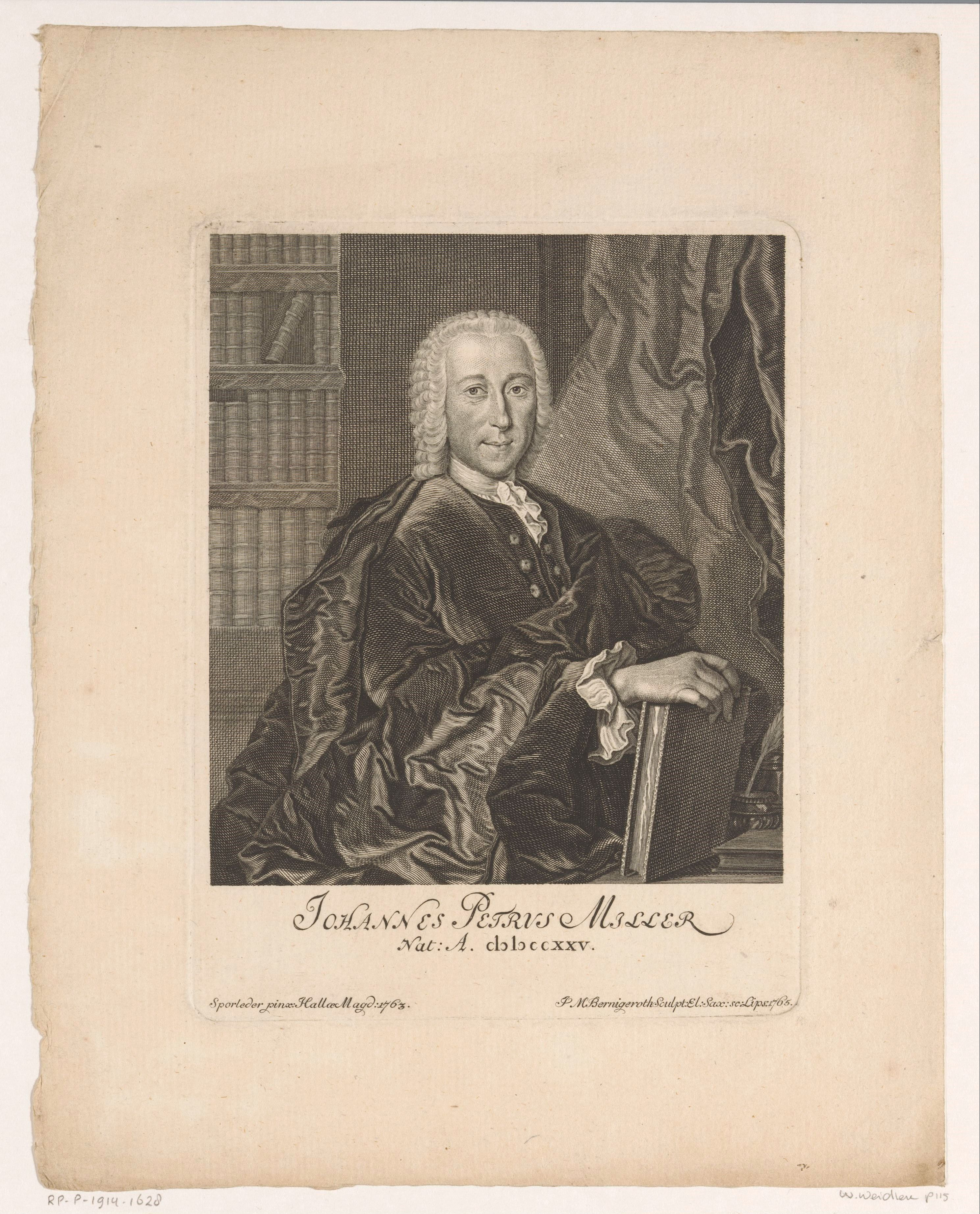 IdentificatieTitel(s): Portret van Johann Peter MillerObjecttype: prent Objectnummer: RP-P-1914-1628Opschriften / Merken: verzamelaarsmerk, verso, gestempeld: Lugt 2228VervaardigingVervaardiger: prentmaker: Johann Martin Bernigeroth (vermeld op object)naar schilderij van: Johann Chistian Heinrich Sporleder (vermeld op object)naar schilderij van: Gottfried Sporleder (vermeld op object)Plaats vervaardiging: prentmaker: Leipzignaar schilderij van: Halle an der Saalenaar schilderij van: Halle an der SaaleDatering: 1765Fysieke kenmerken: gravureMateriaal: papier Techniek: graveren (drukprocedé)Afmetingen: plaatrand: h 192 mm × b 146 mmOnderwerpWat: historical personsbookbookshelvesWie: Johann Peter Miller (1725-1789)Verwerving en rechtenVerwerving: aankoop 1905Copyright: Publiek domein